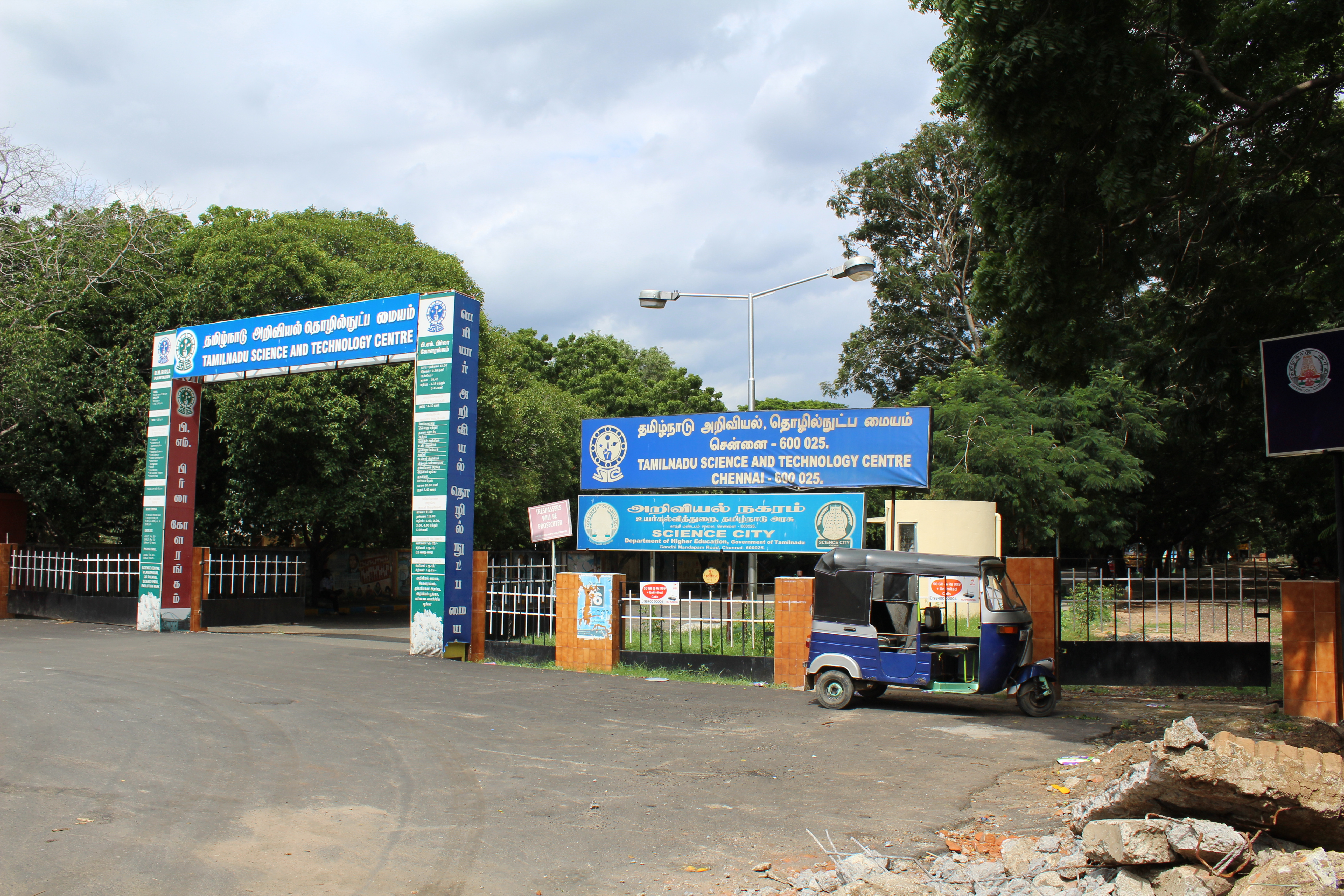 Periyar Science and Technology Centre and Birla Planetarium, Chennai